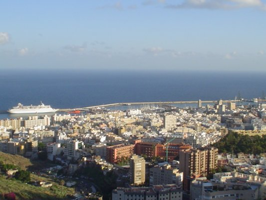 Vista panorámica de Santa Cruz de Tenerife desde Ifara